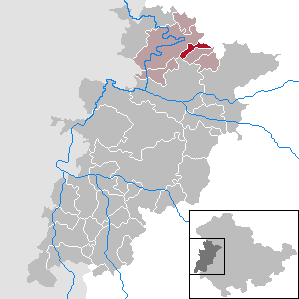 Lauterbach in Thuringia - Wartburgkreis